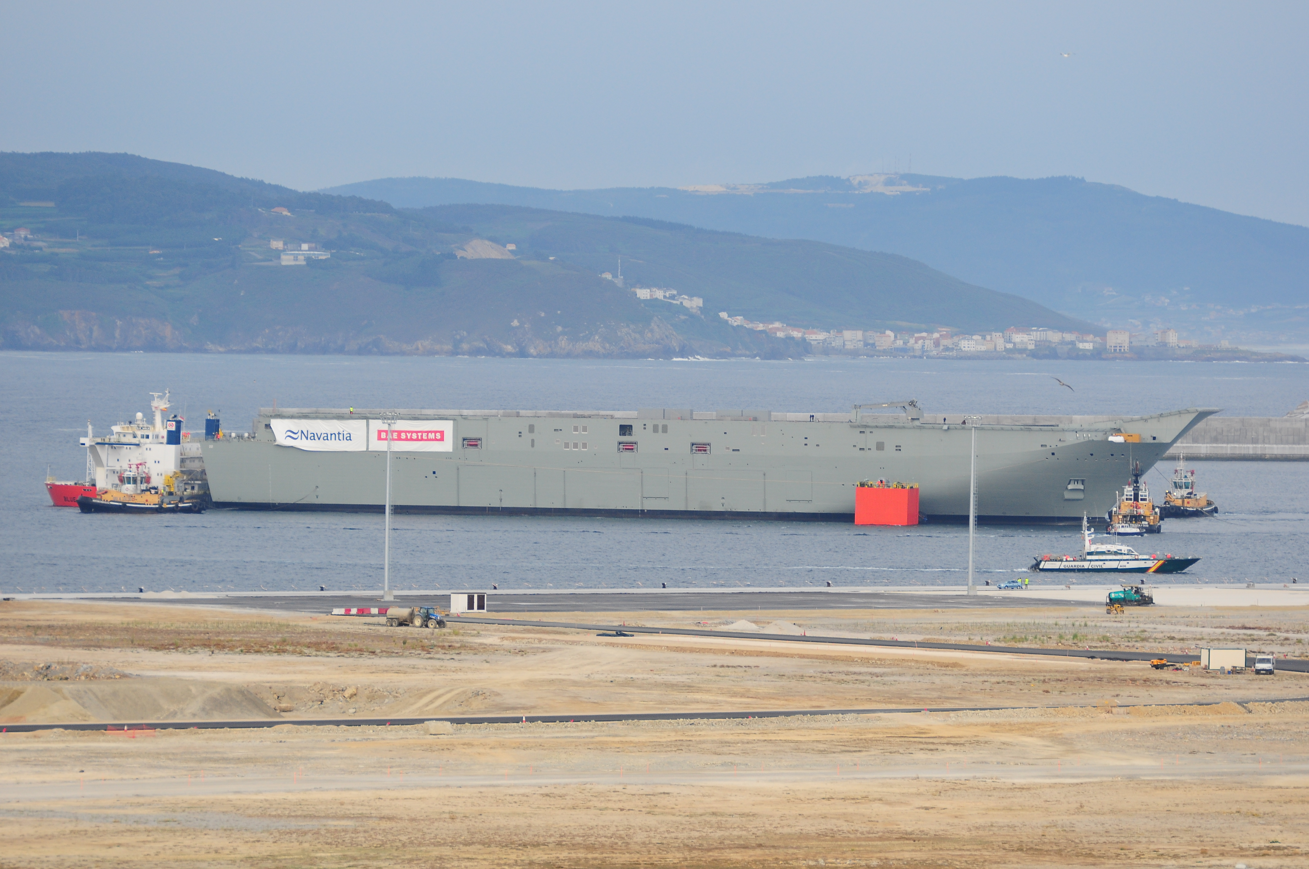 HMAS Canberra (LHD 02) LHD sobre plataforma Blue Marlin, en Punta Langosteira (Arteixo, A Coruña, Spain)